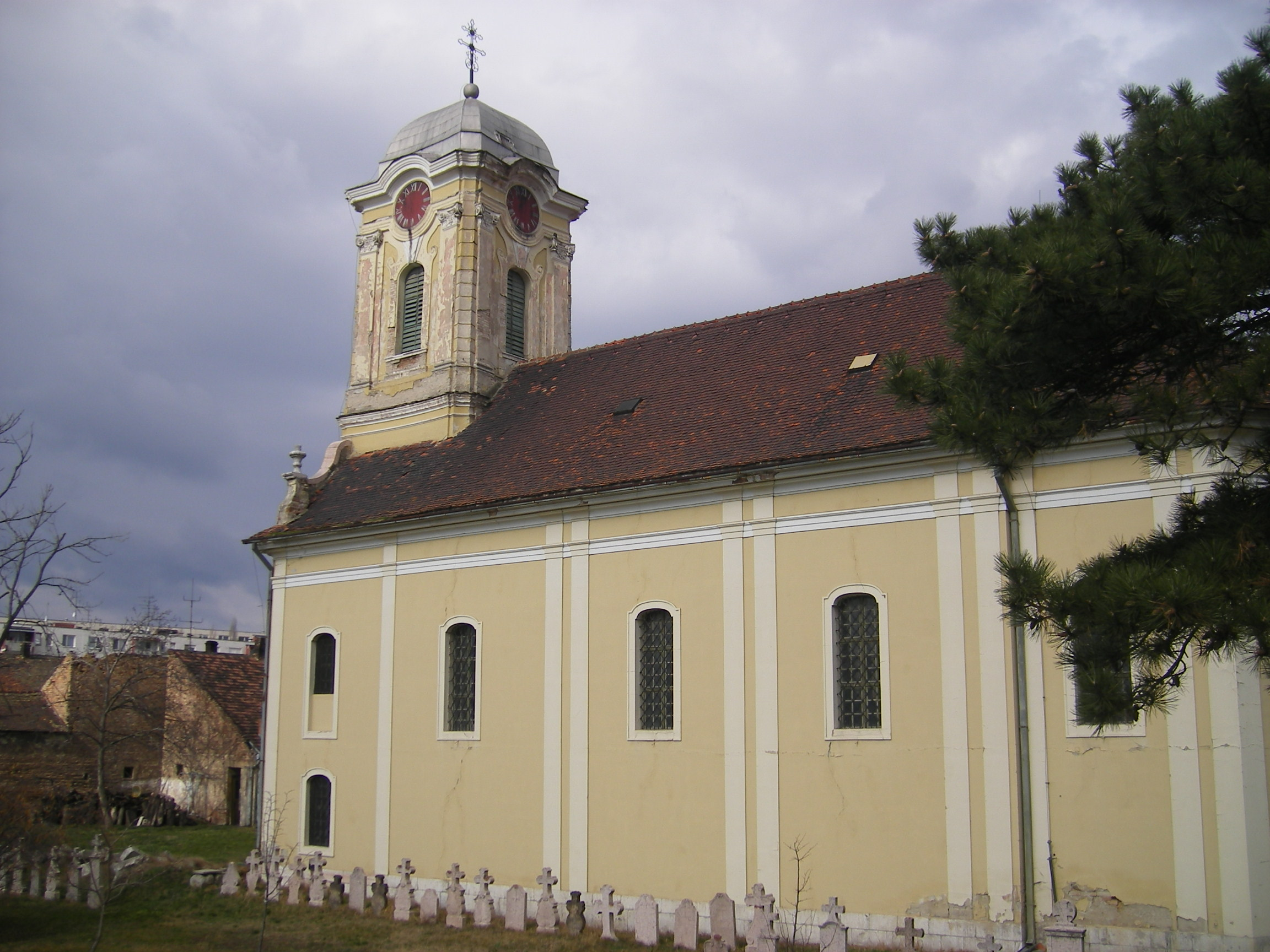 Komárom - görögkeleti templom